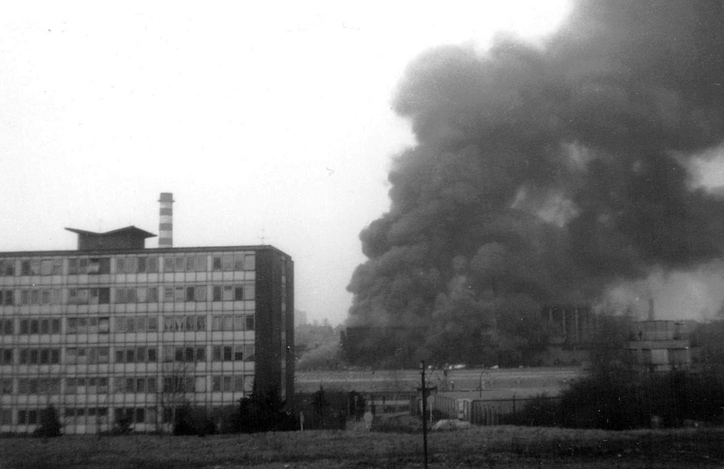 Praha, Záběhlice, požár míchárny gumových směsí továrny Mitas. Likvidace se účastnilo 141 hasičů, z nichž čtyři byli zraněni. Výsledná škoda přes 500 milionů Kčs.